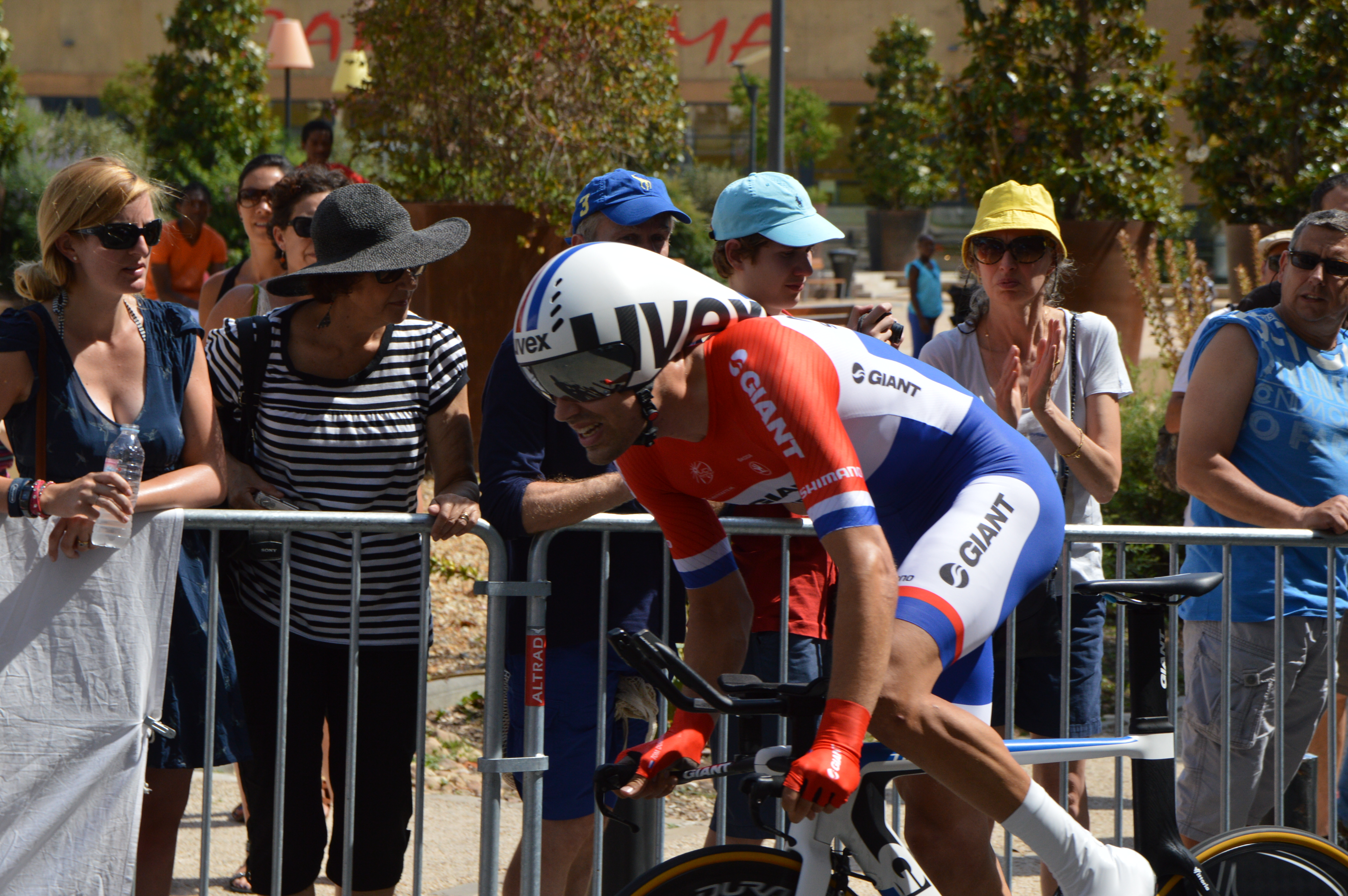 Clm Bergerac-Périgueux